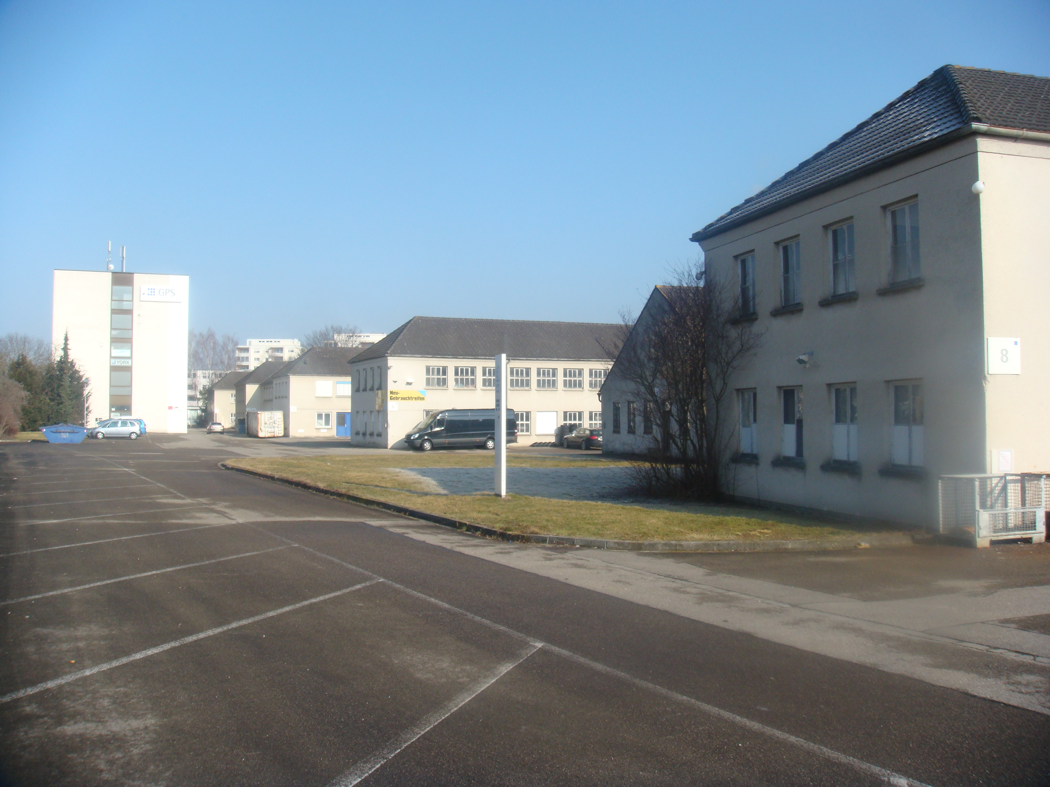 Uhrenfabrik Senden. Jetzt Gewerbepark Senden